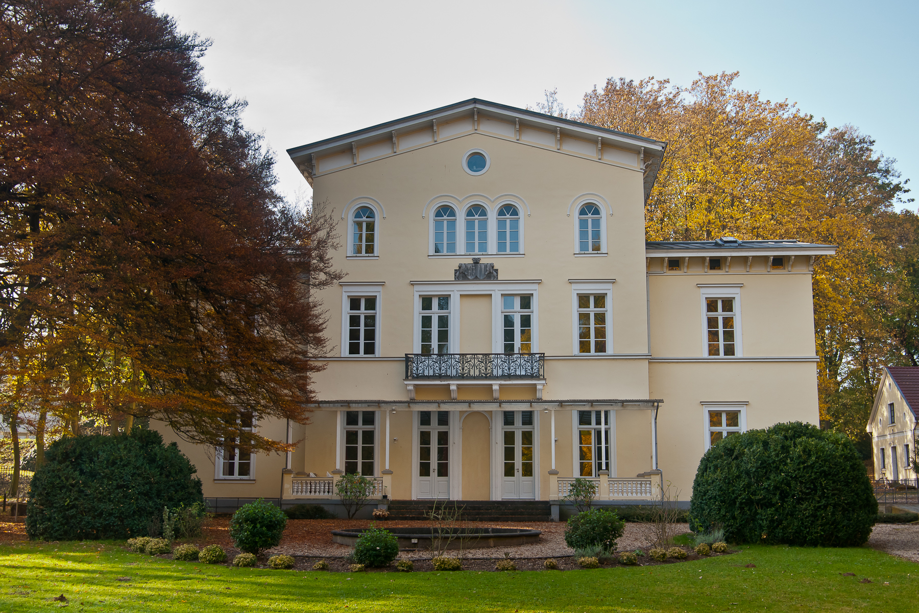 Bornheim-Roisdorf, Denkmalnummer 34, Ehrental 2-4, (Haus Wittgenstein) This is a photograph of an architectural monument.